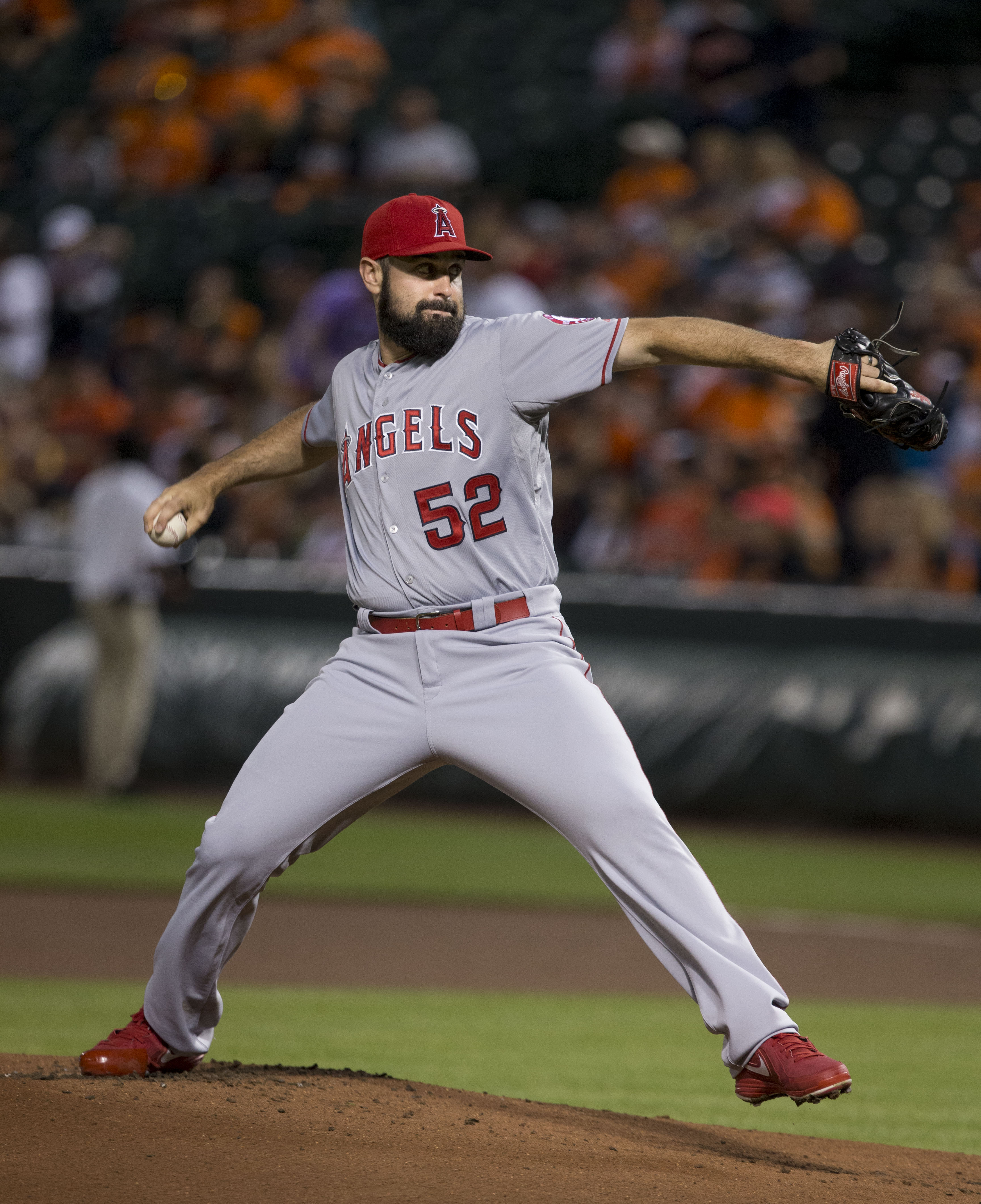 Matt Shoemaker